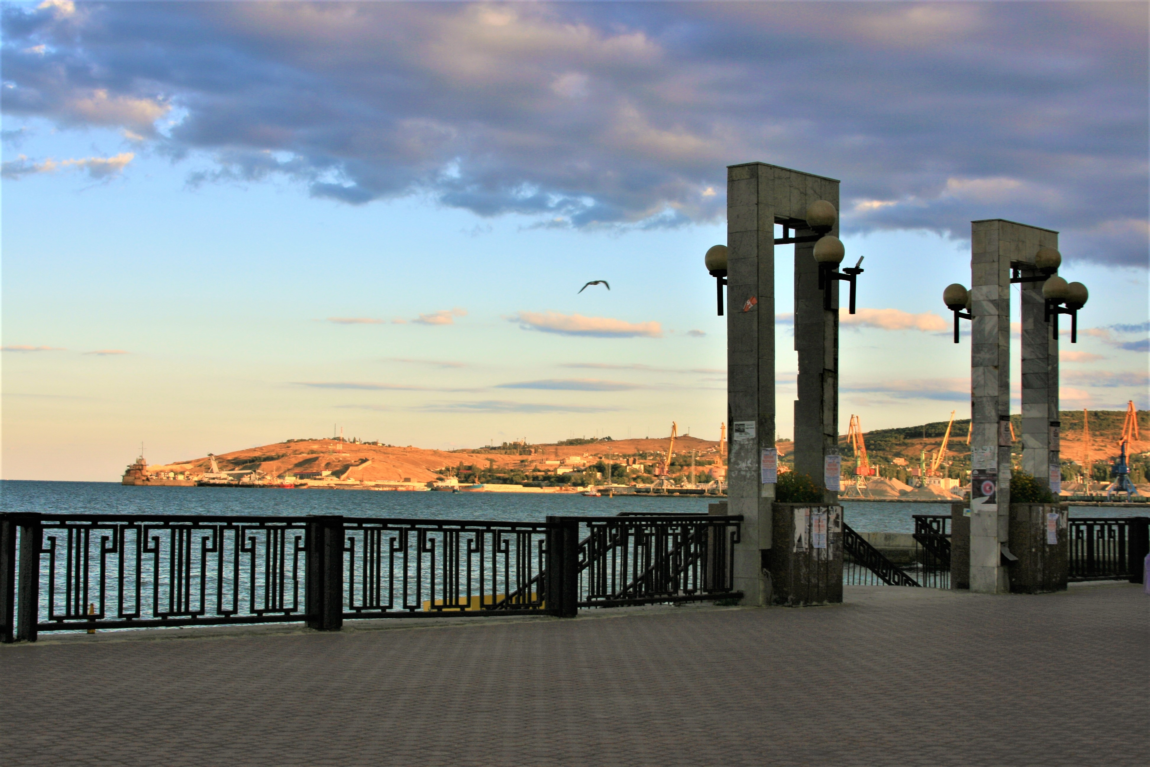 набережная Айвазовского в Феодосии